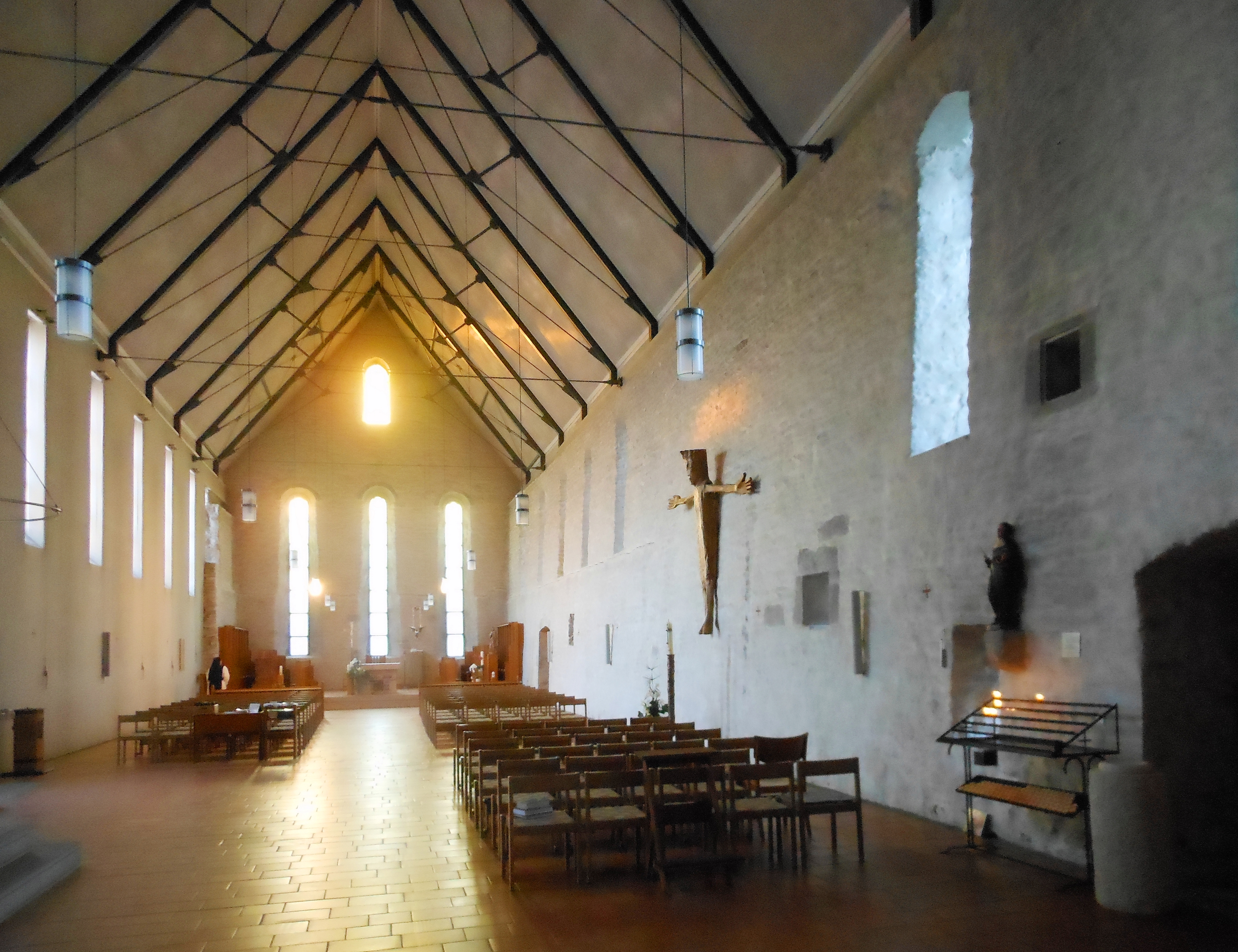 Helfta, Klosterkirche St. Maria, Inneres